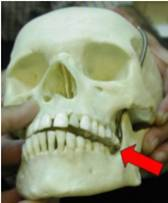 Movimiento de lateralidad mandibular hacia la derecha, movimiento como si masticara por el lado derecho. La flecha señala la zona del compromiso, lado izquierdo, donde el borde vestibular del +8 impacta con la cara interna de la rama ascendente de la mandíbula